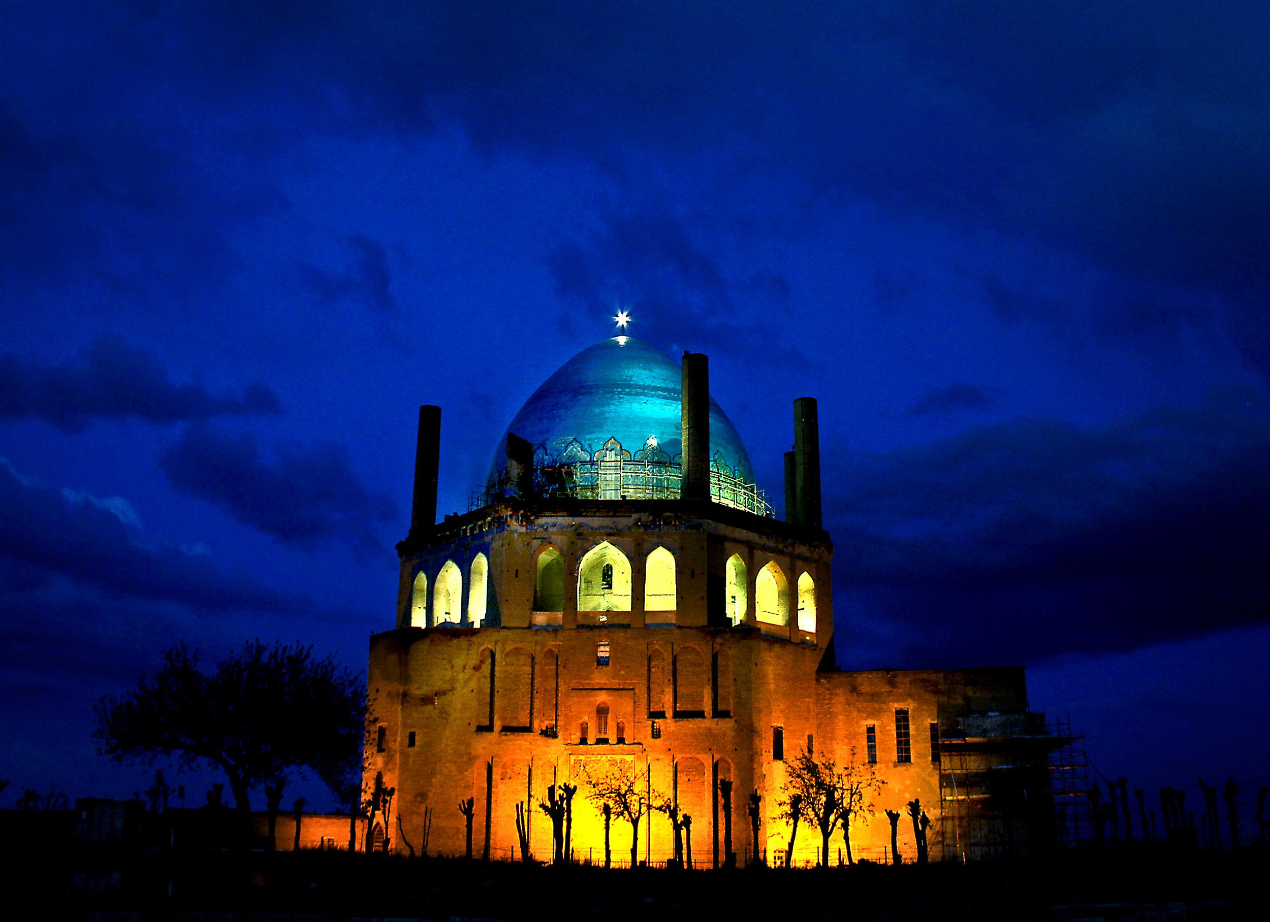 مقبره سلطان محمد خدابنده الجایتو